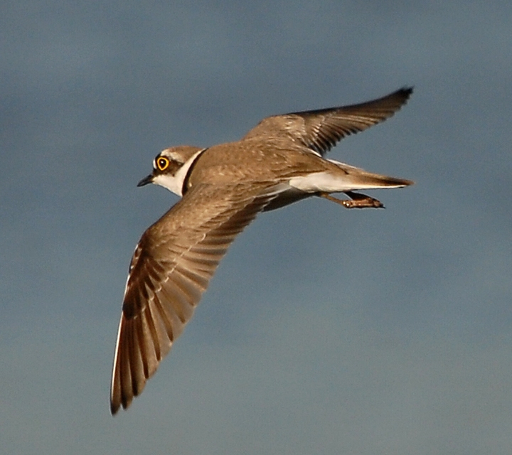 Väiketüll kuulub Eestis III kaitsekategooriasse. Tal on kollane silmarõngas, must nokk, lennul on tal nähtav tiivaalune valge joon. Noorlindudel puudub silma taga hele laik ja otsaesine on tumedam kui liivatülli noorlinnul. Väiketüll pesitseb kiviklibul mageveekogude ääres ja harvem ka kruusaaukudes. Teinekord pesitseb ka mererannas. Toitu meeldib otsida mudastest kohtadest, mere ääres näiteks mõõnaga tekkinud laidudelt.